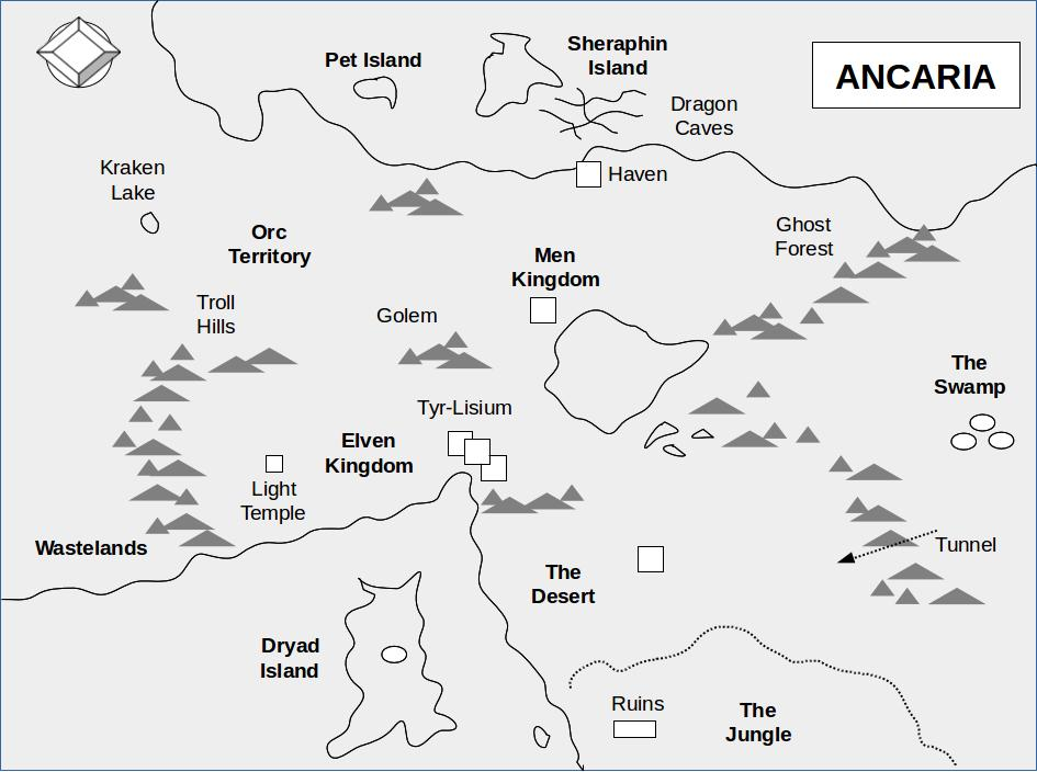 Mapa de Ancaria, el continente donde se desarrollan los videojuegos de la saga Sacred